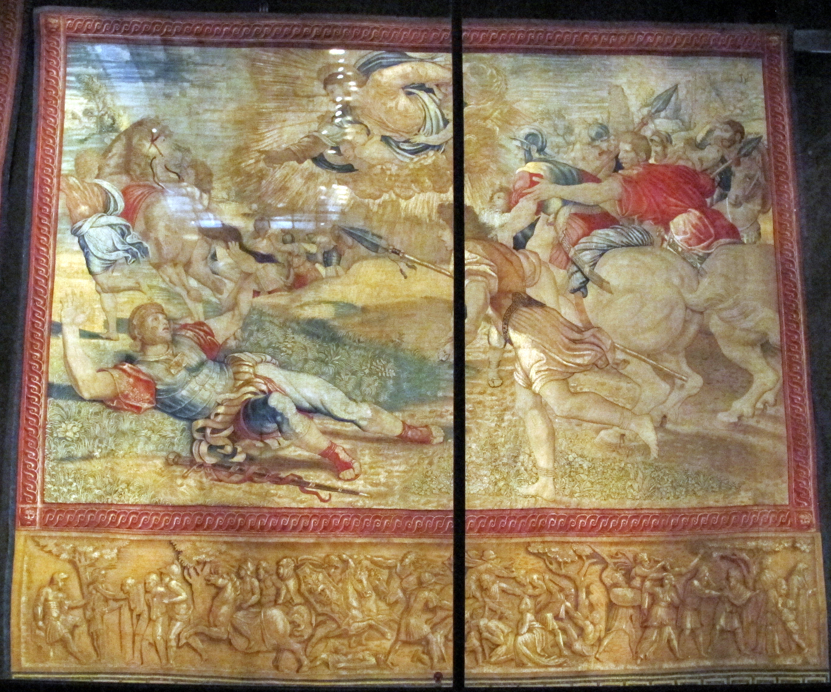 Pinacoteca Vaticana